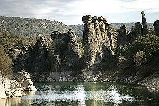 Los Frailes, El Sotillo (Guadalajara), foto propia.